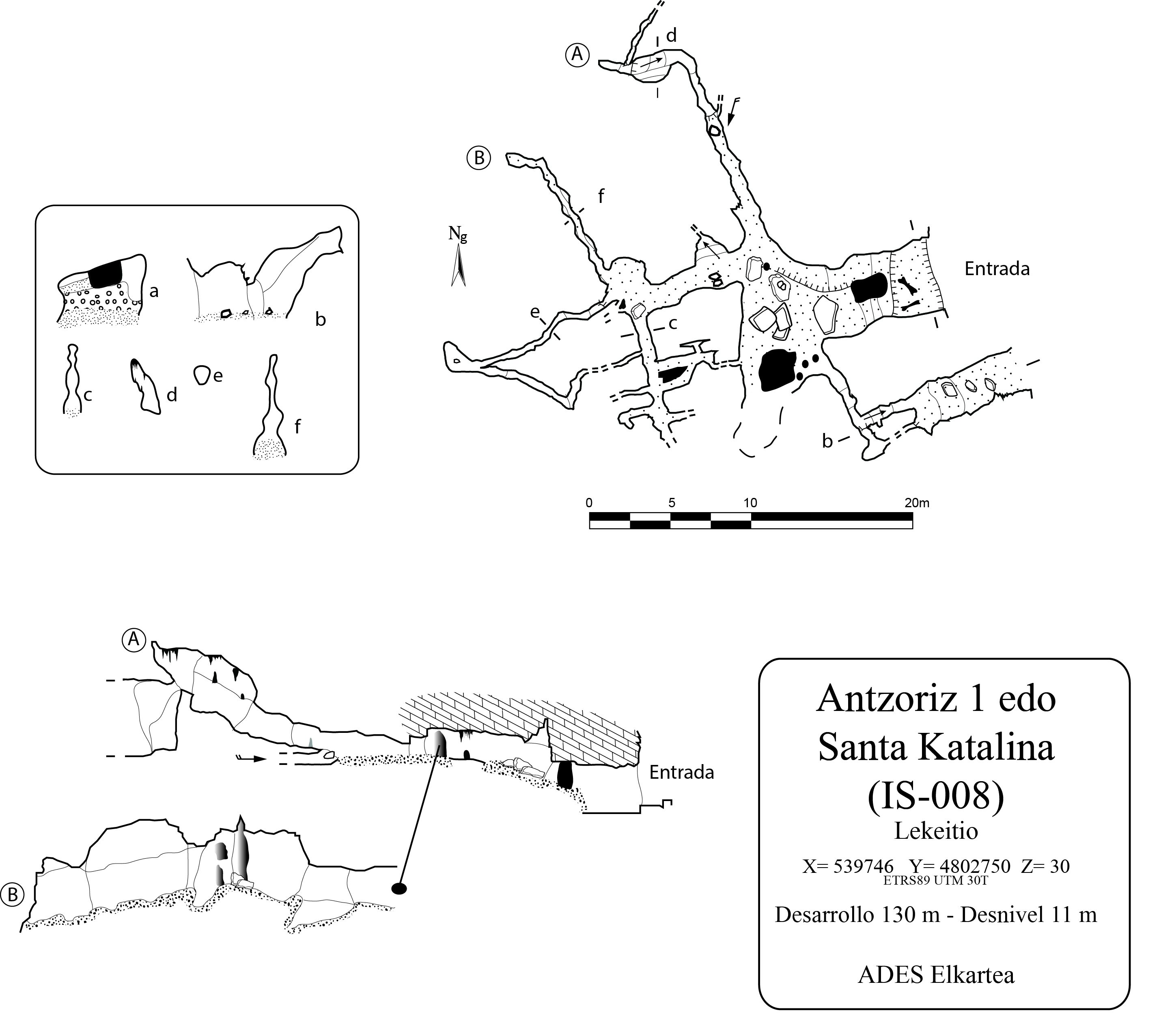 Antzoriz I / Santa Katalina kobazuloaren topografia (Lekeitio).